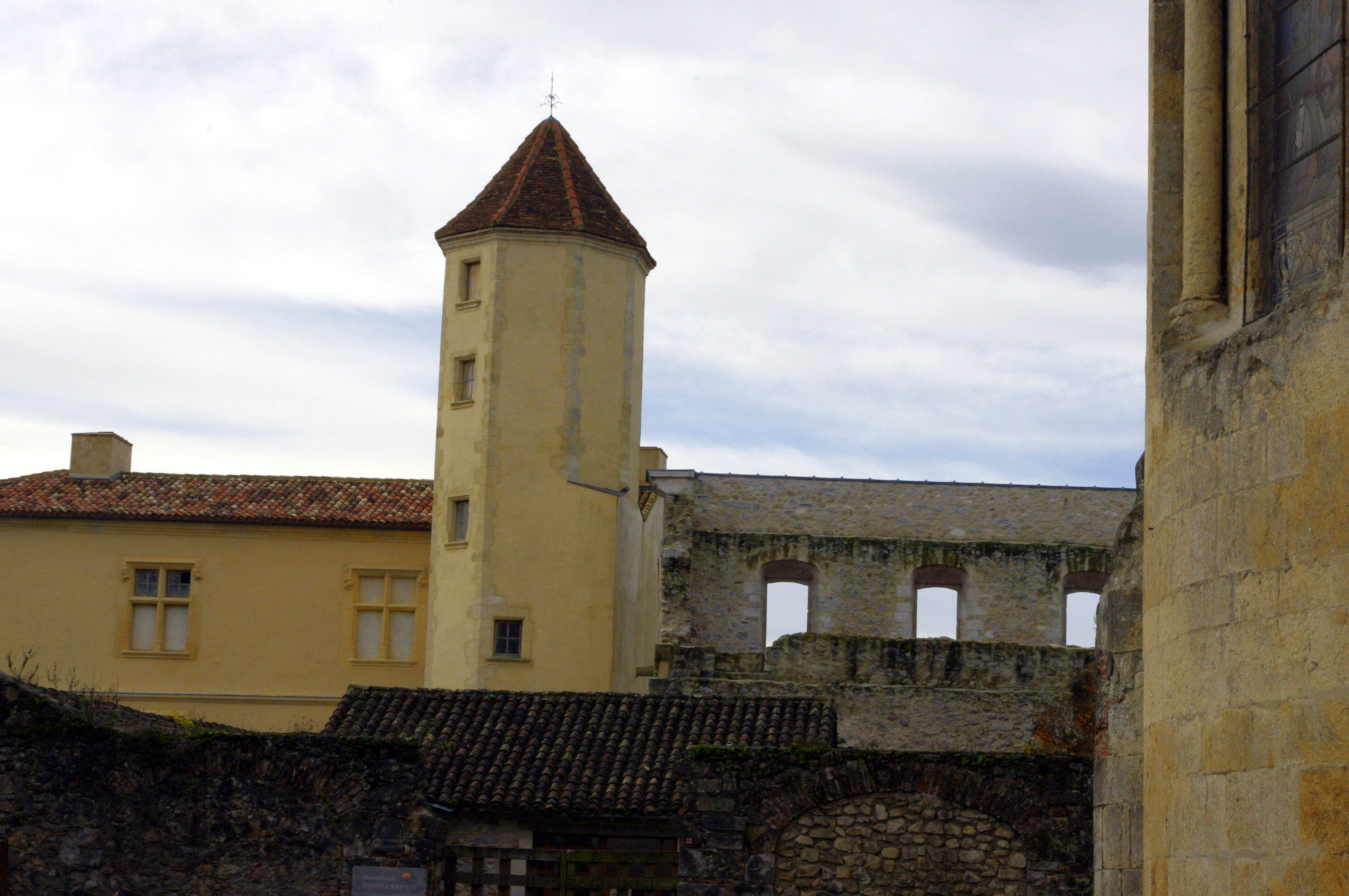 Sorde l'Abbaye - abbaye